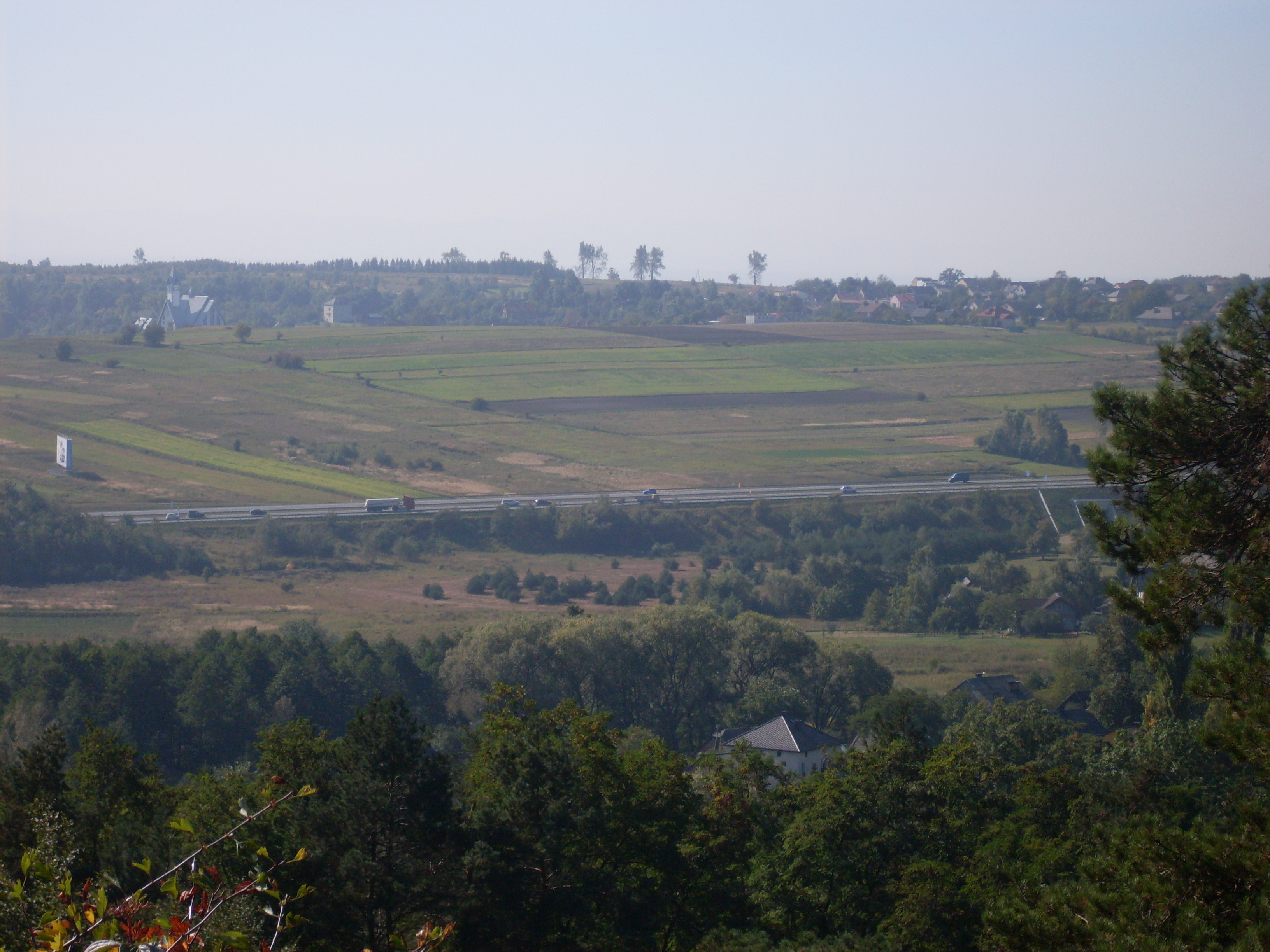 Widok na autostradę A4 i miejscowość Grojec z Zamku Tenczyn w Rudnie